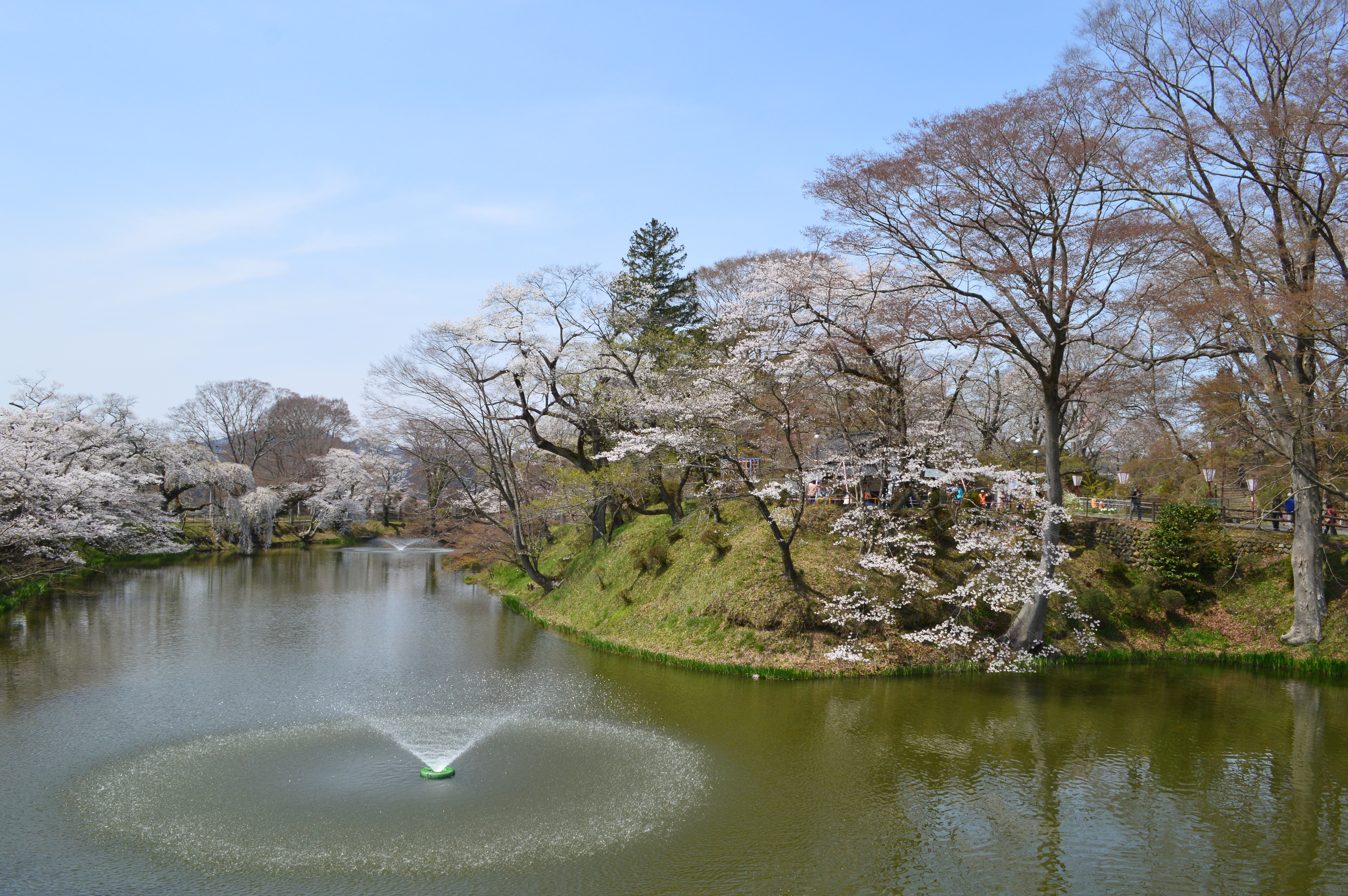 棚倉城 水堀